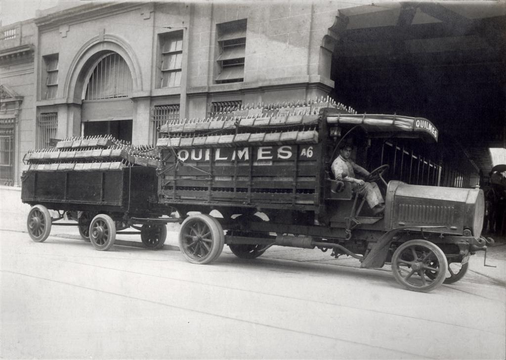 Cerveceria Quilmes en 1910